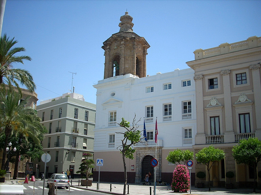 iglesia de San Juan de Dios de la hermandad de la Santa Caridad